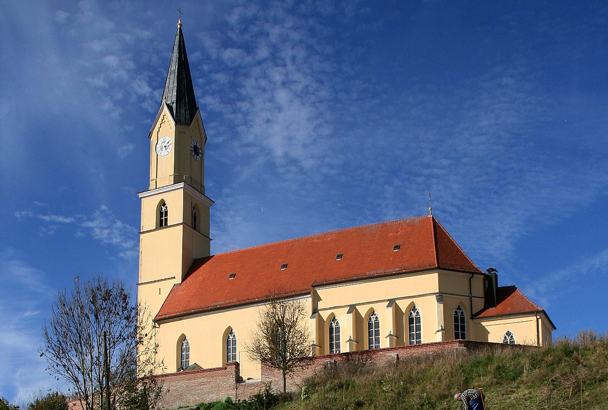 Wallfahrtskirche Mariä Himmelfahrt in Ranoldsberg (Ortsteil von Buchbach, Landkreis Mühldorf am Inn, Oberbayern). Der erste Kirchenbau geht auf das Ende des 13. Jahrhunderts zurück. 1507 Weihe des spätgotischen Nachfolgebaus, der für notwendig erachtet wurde um dem angewachsenen Strom von Wallfahrern mehr Platz zu bieten. Ab 1723 wurde die Kirche im Zeitgeschmack innen und außen umgestaltet, barockisiert. 1883 fand wiederum innen und außen die neugotische Umwandlung (Regotisierung), das heutige Erscheinungsbild seine Vollendung.